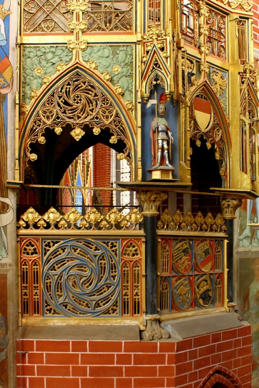 Oktogon-Kapelle (um 1370) im Doberaner Münster